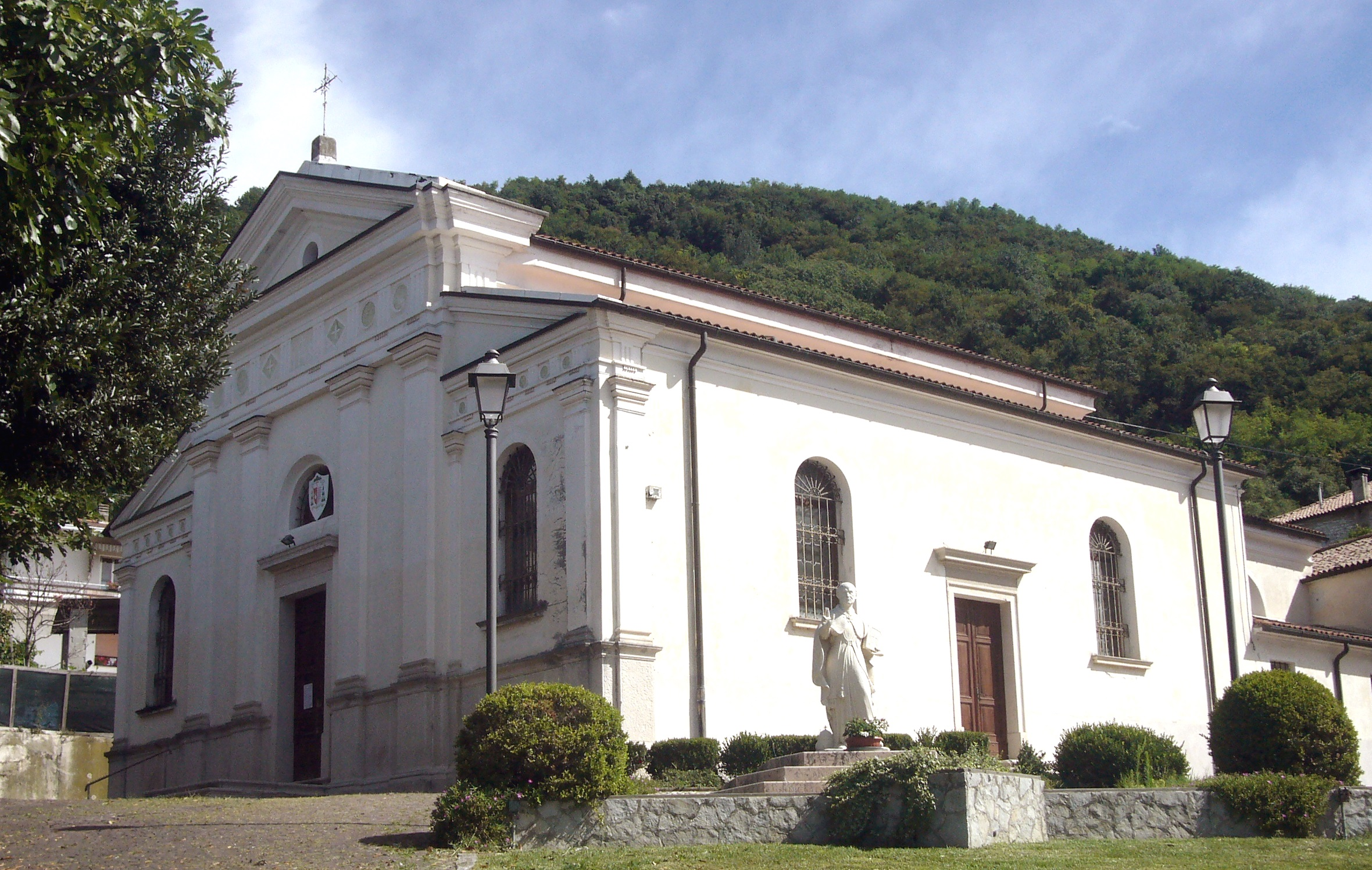 La chiesa parrocchiale di San Vito, frazione di Valdobbiadene